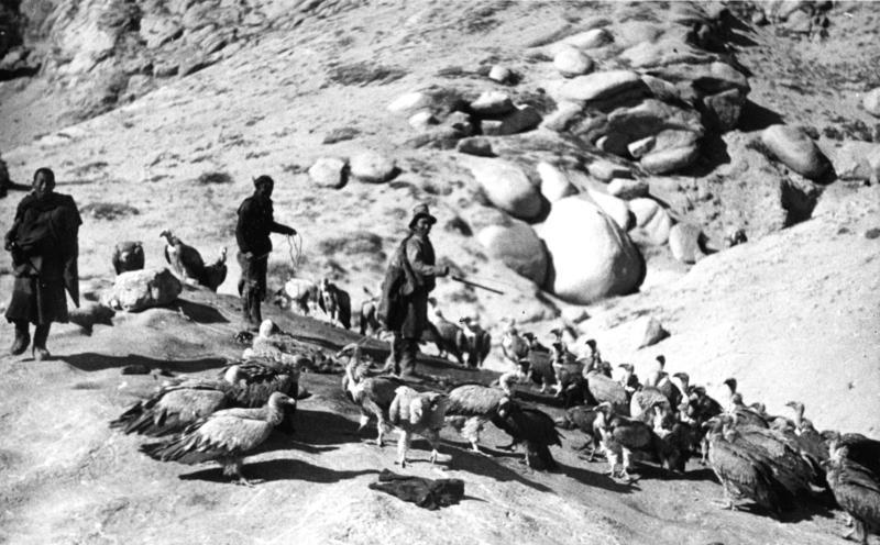 Lhasa, Leichenzerschneidung und Geier